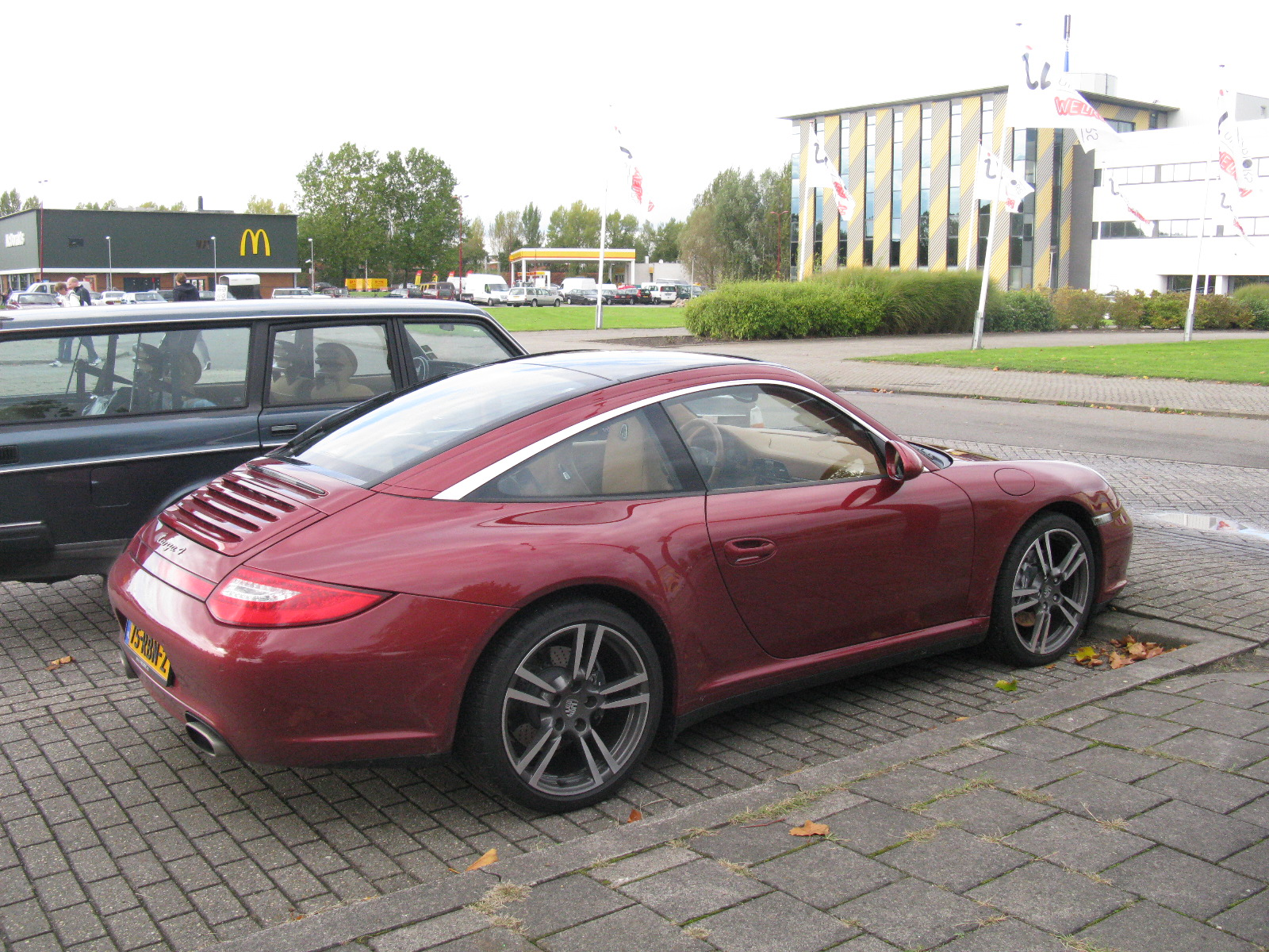 Porsche 911 (997) Carrera Targa